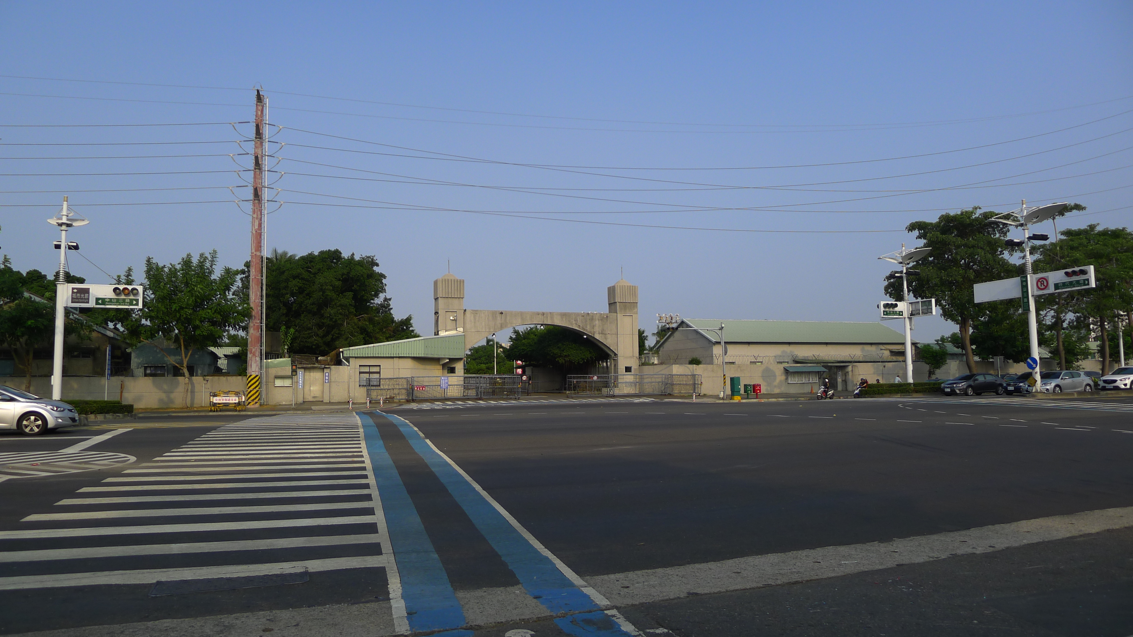 中文（台灣）: 國防部軍備局生產製造中心第205廠前鎮廠區正門，位於臺灣高雄市前鎮區中山三路、時代大道口。